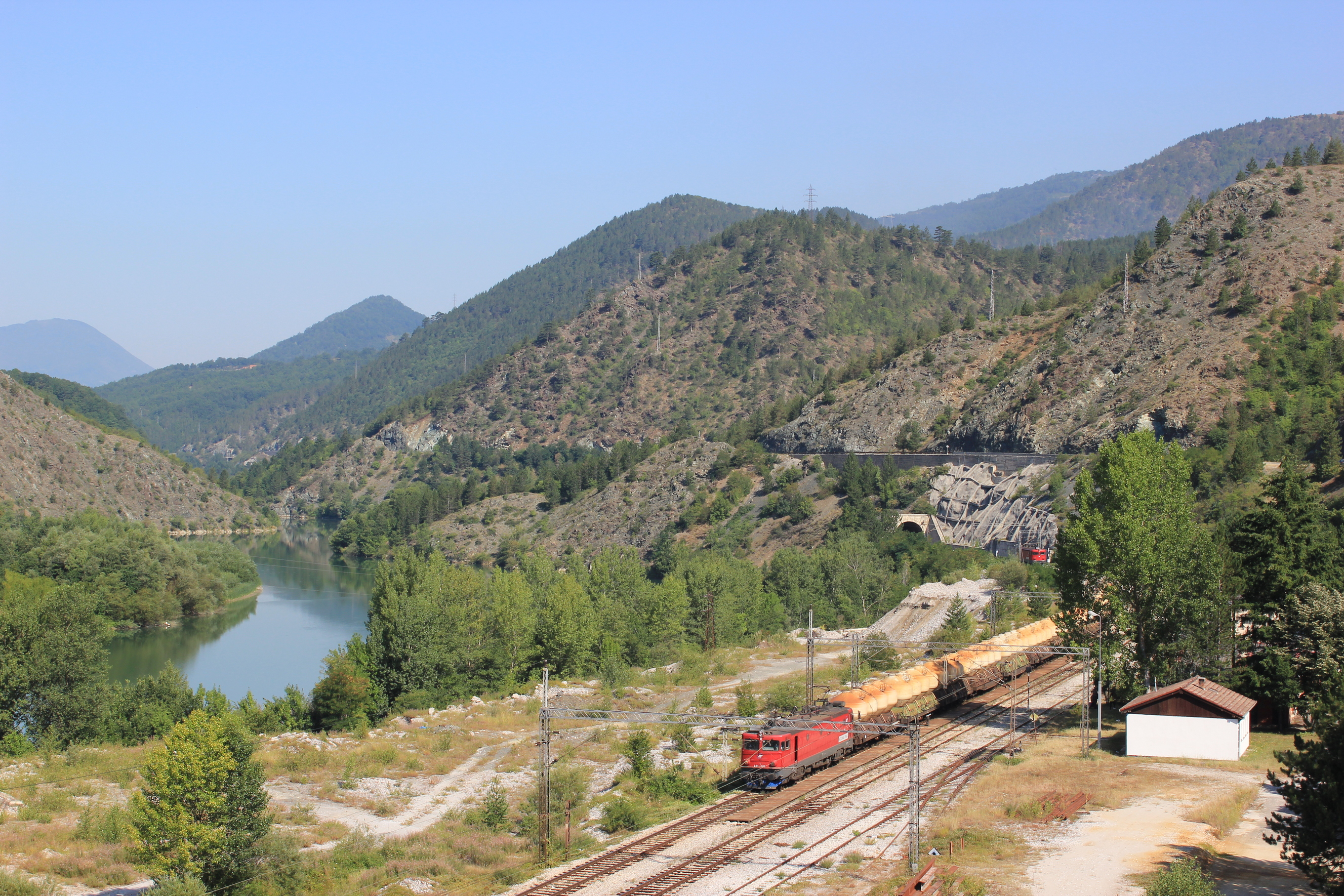 Die Bahnstrecke Belgrad–Bar bei Priboj in Südserbien.Hornjoserbsce: Železniska čara Běłohród-Bar blisko Priboja w južnej Serbiskej.